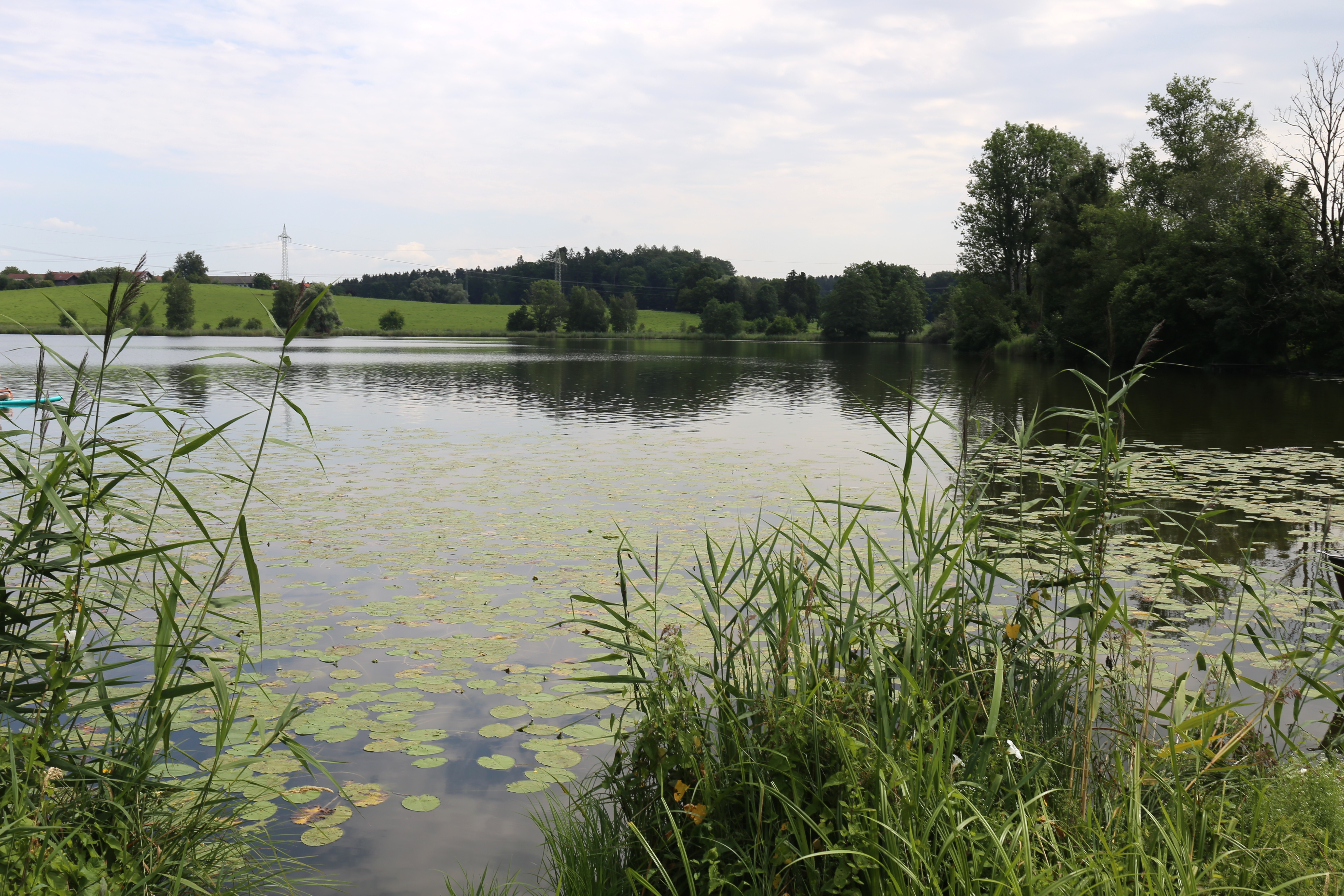 Penzing, Babensham; Penzinger See, im Landschaftsschutzgebiet Schutz von Landschaftsteilen um den Penzinger See (LSG-00101)